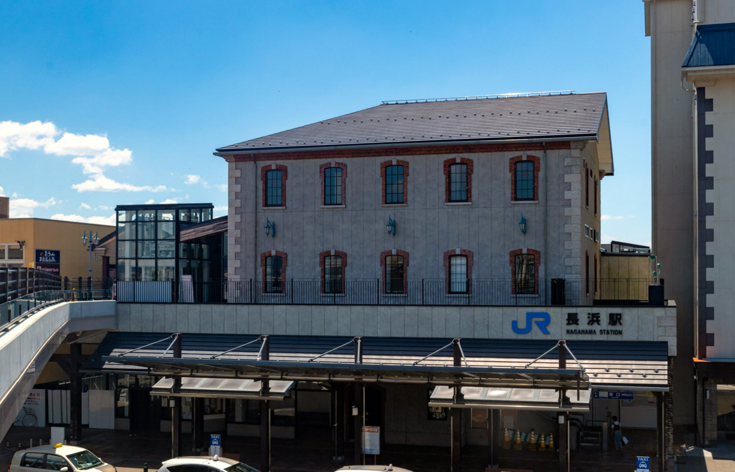 西日本旅客鉄道北陸本線（JR琵琶湖線）長浜駅東口（伊吹口）駅舎（2019年8月）